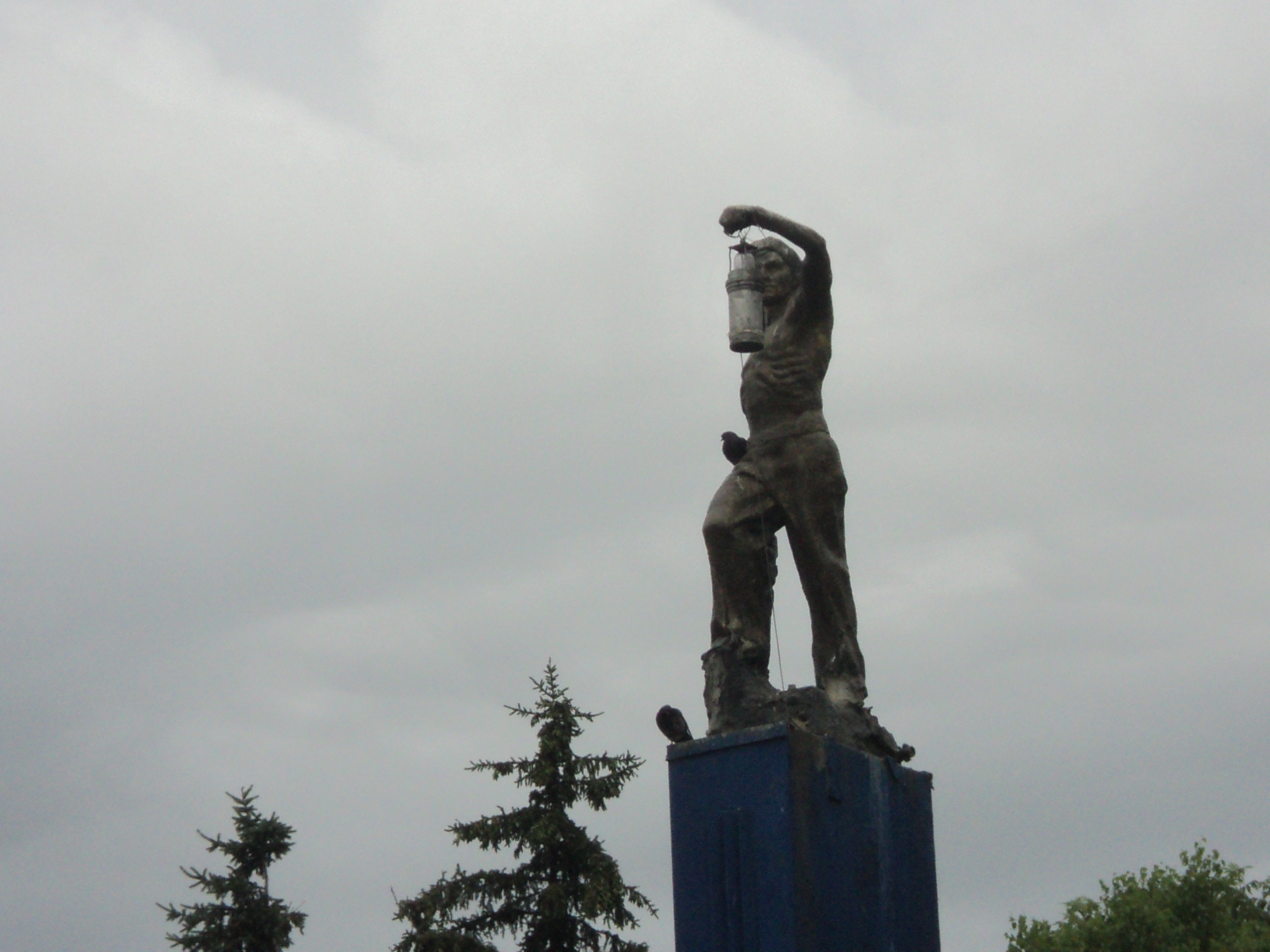 Скульптура шахтёра на входе в городской парк Партизанска: один из символов города